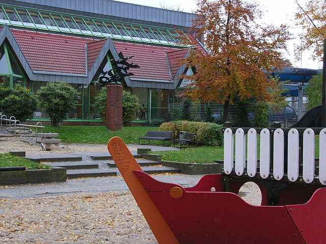 Freizeitbad Hückelhoven